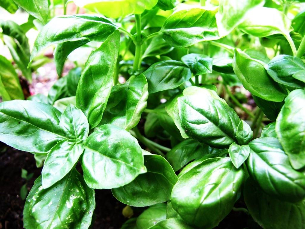 Ocimum basilicum